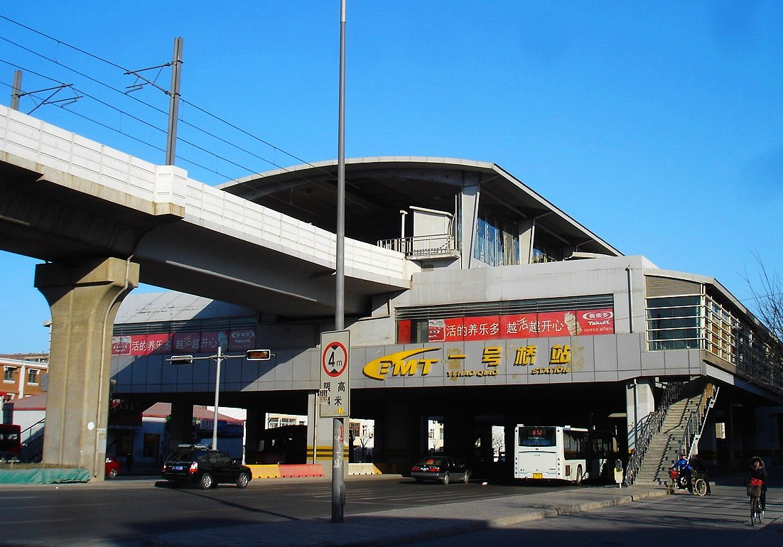 中文（中国大陆）: 一号桥站（地铁津滨线，地铁九号线）